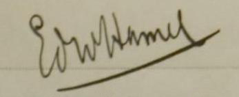 Подпись Эдварда Хамела